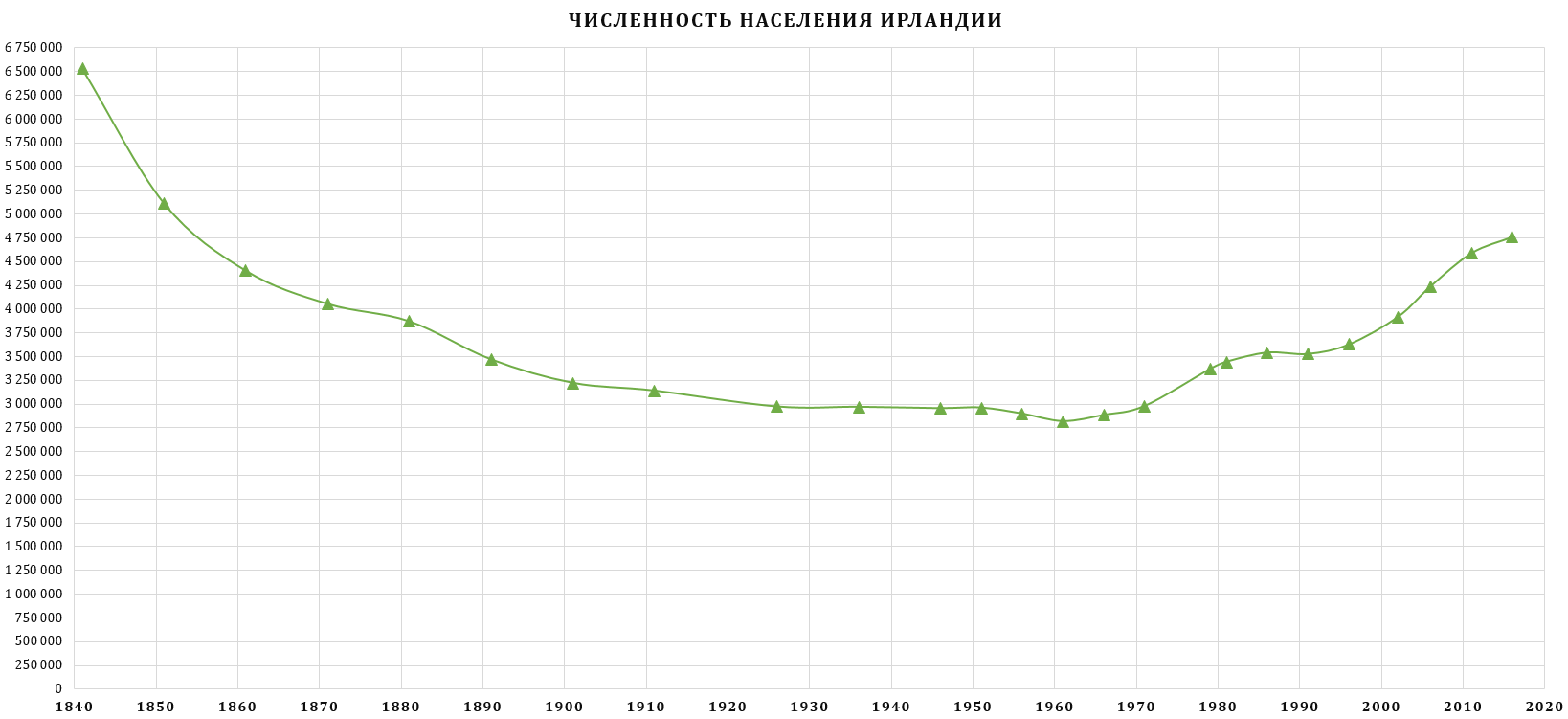 Численность населения Ирландии 1841-2016